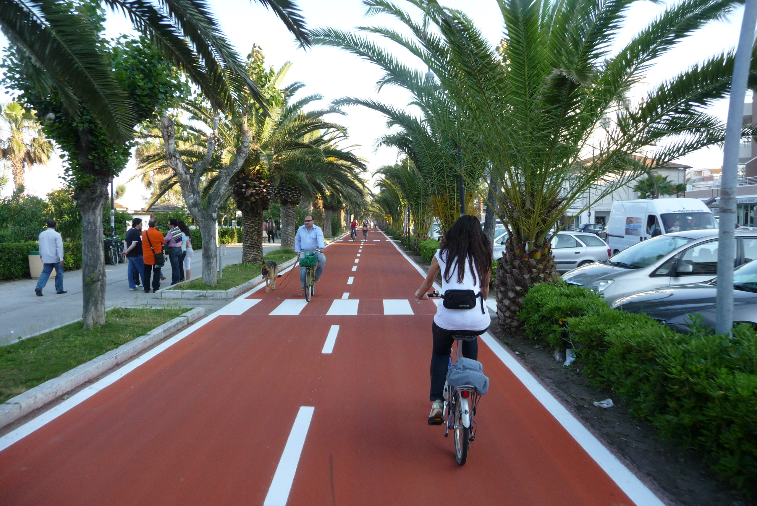 Lucio De Marcellis, fonte personale, Ciclovia Adriatica ad Alba Adriatica (Teramo), GFDL e Creative Commons CC-BY-40